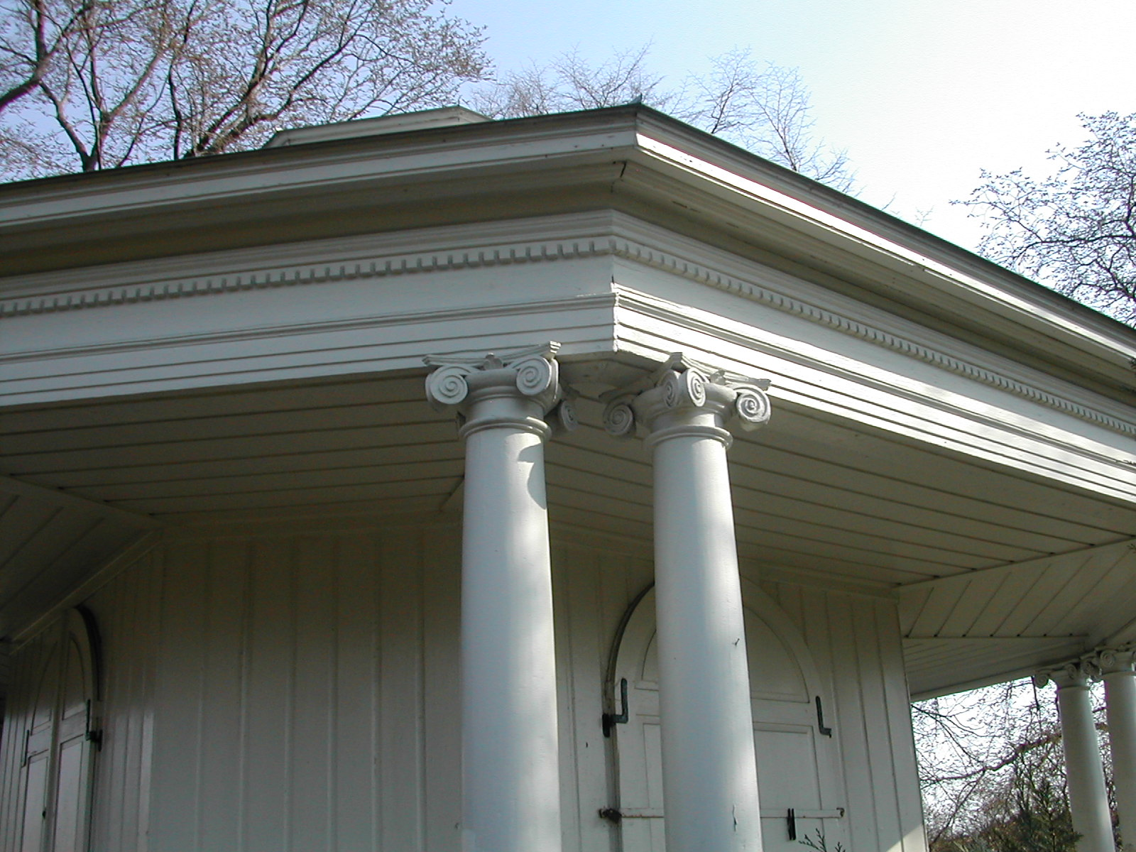 Frogner Manor in Oslo